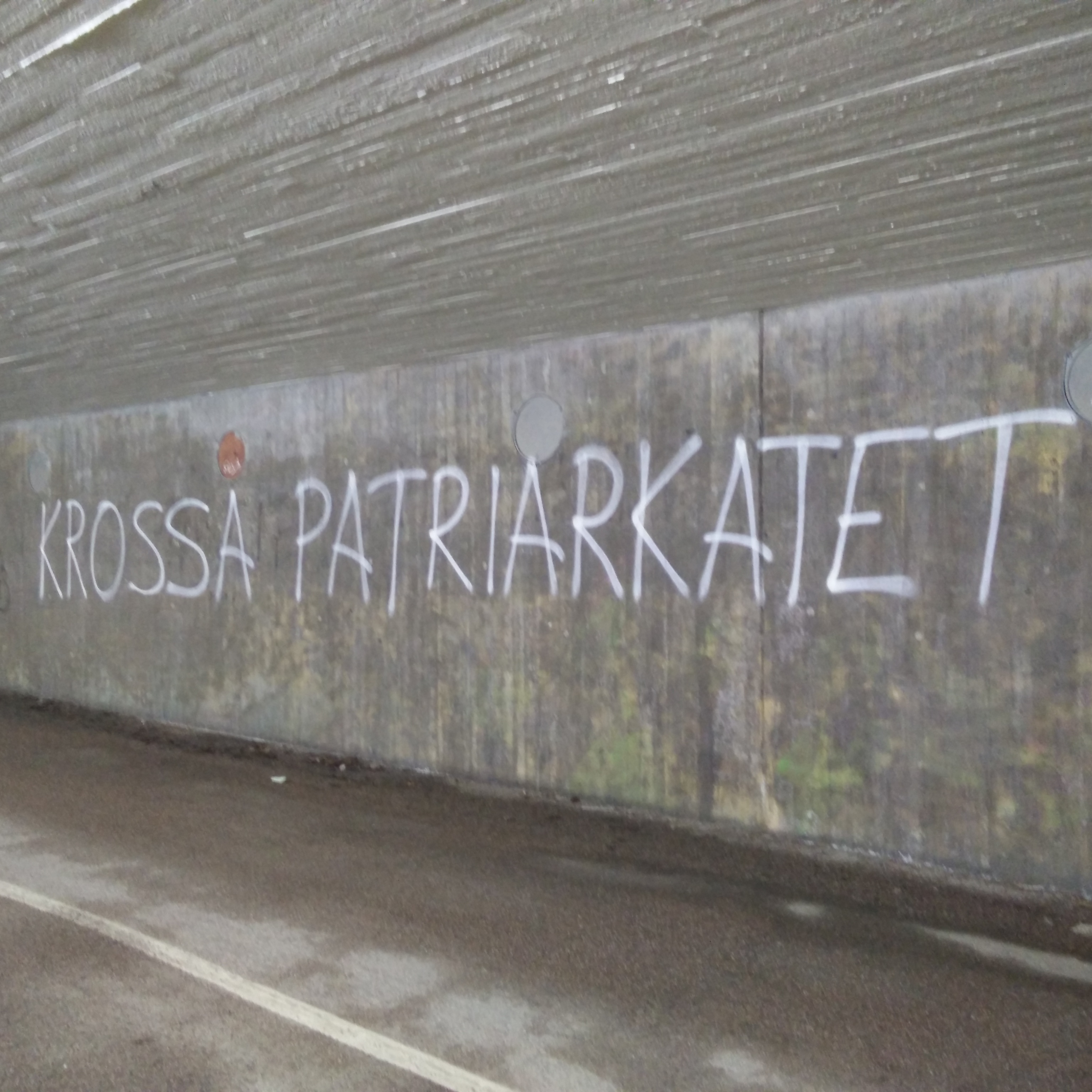 Klotter i gångtunnel under Luthagsesplanaden i Uppsala i riktning mot Börjegatan.